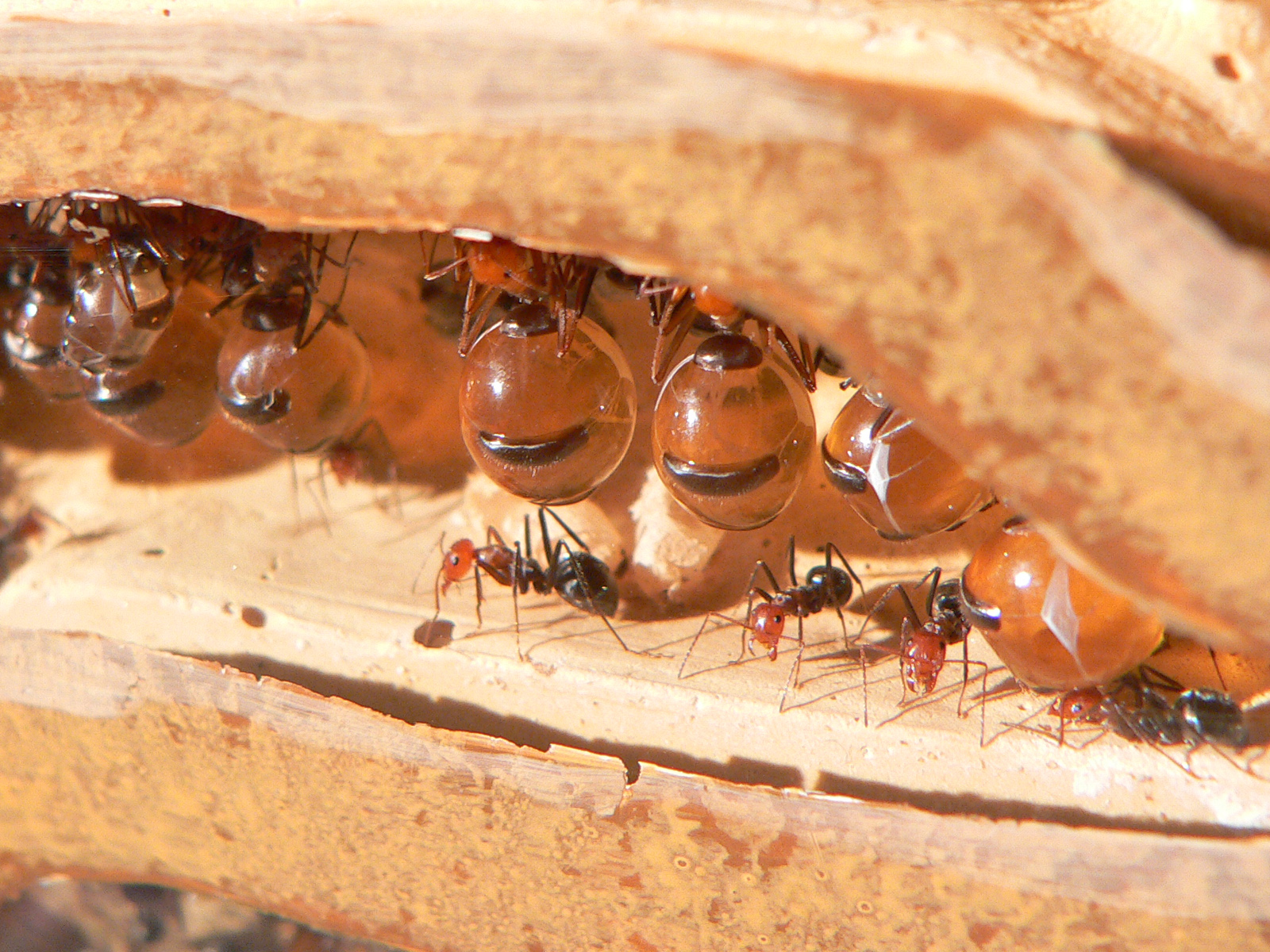 Myrmecocystus ants storing nectar to prevent colony famine. Taken at the Cincinnati Zoo. Photo by Greg Hume uk: Медові мурахи зберігають нектар в своїх співплемінниках. Сфотографовано в зоопарку м. Цинцинатті.